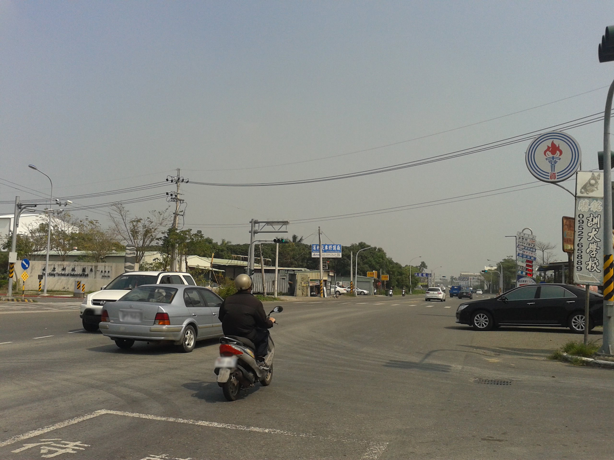 台20線中山北路(永康區)靠近新化地區的左側為永康科技園區。